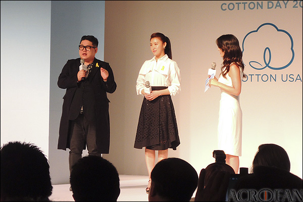 미국면화협회 ‘코튼데이 2014’ 축하행사